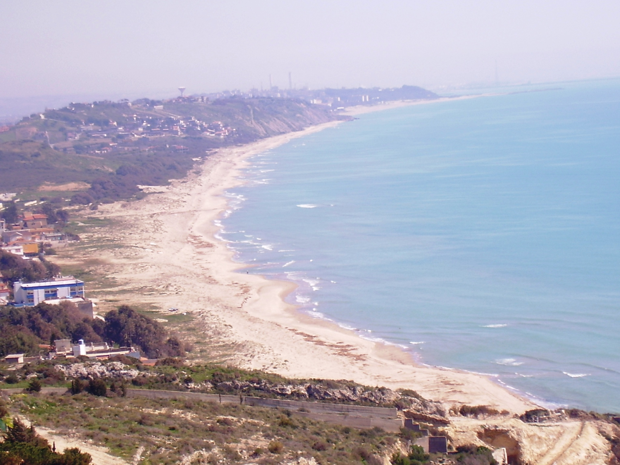 Il Golfo di Gela visto dalla Torre di Manfria - lato est